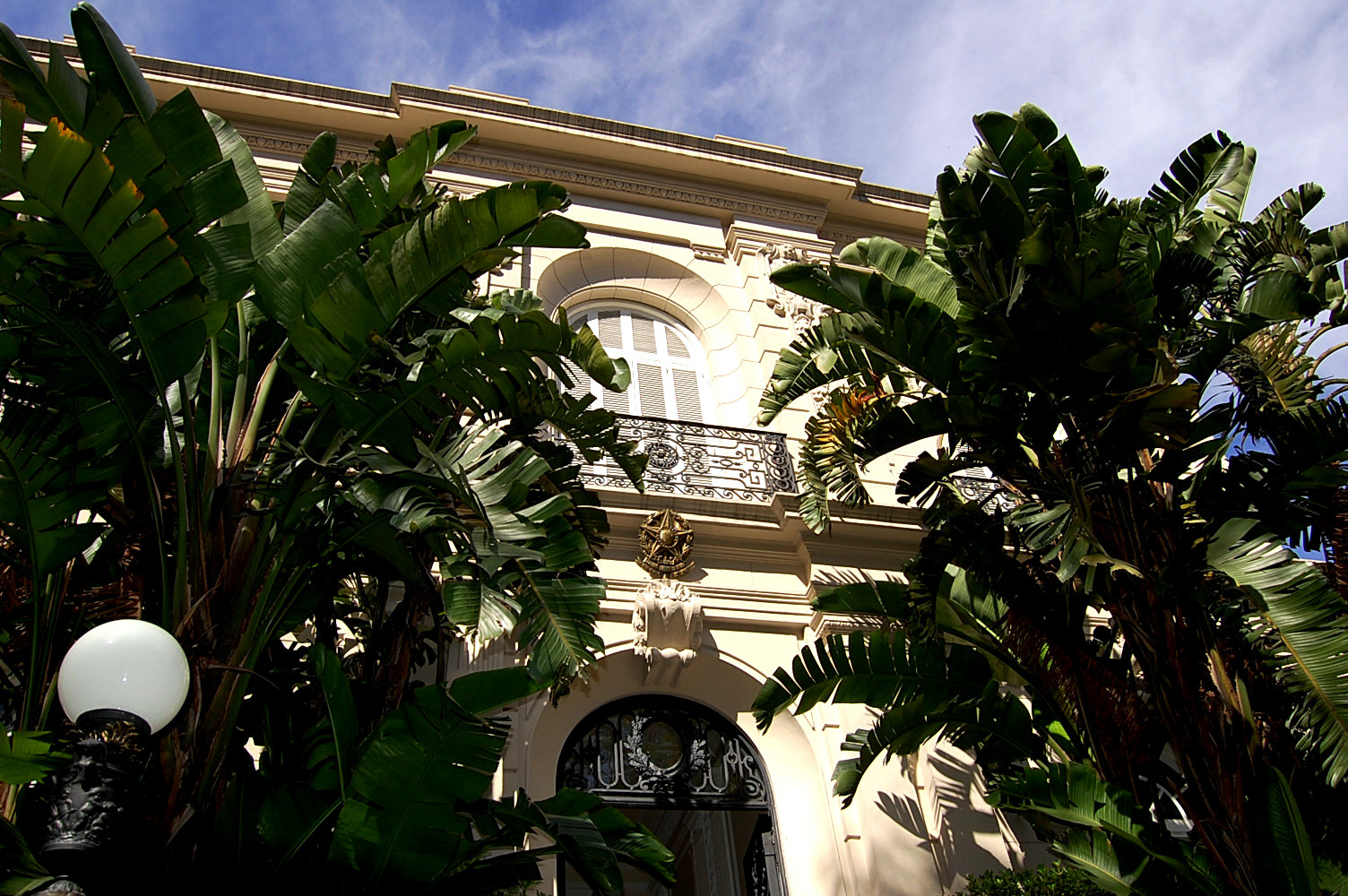 Viv. Pietracarpina/Emb. Brasil. Ubicada en el departamento de Montevideo